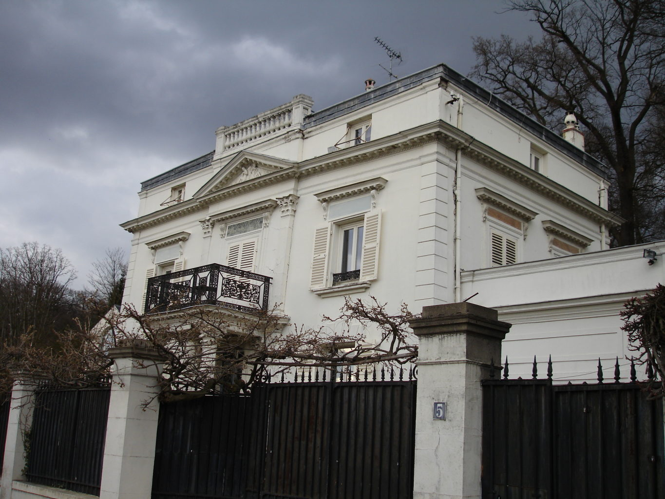 Maison Jean Bertheroy à Montmorency (France)